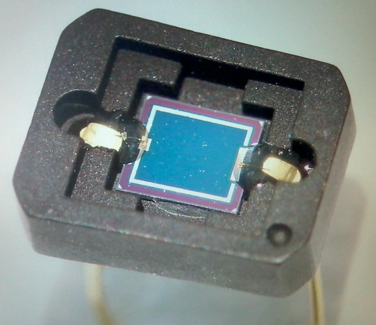 Знято мобілкою Самсунг